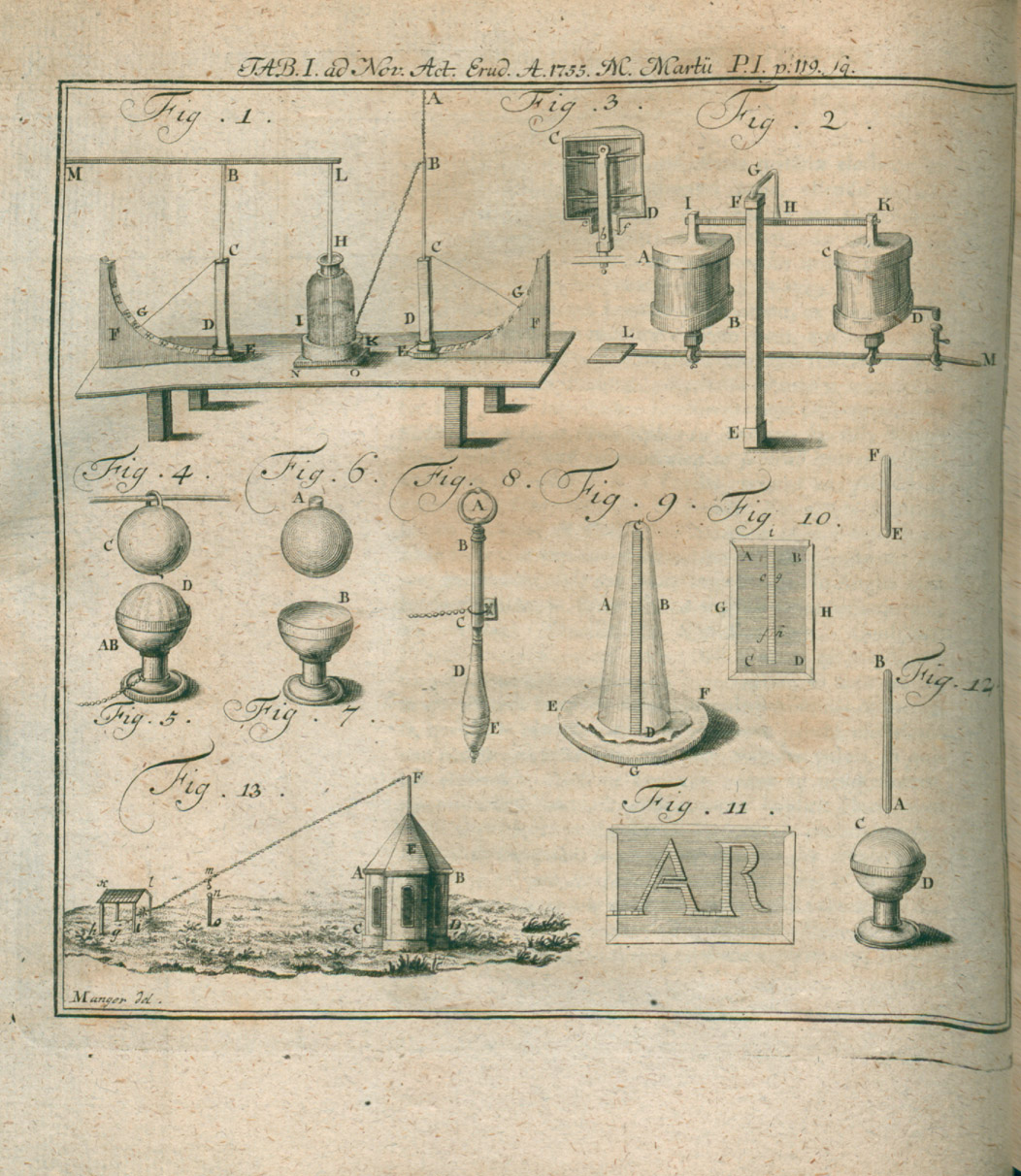 Illustration